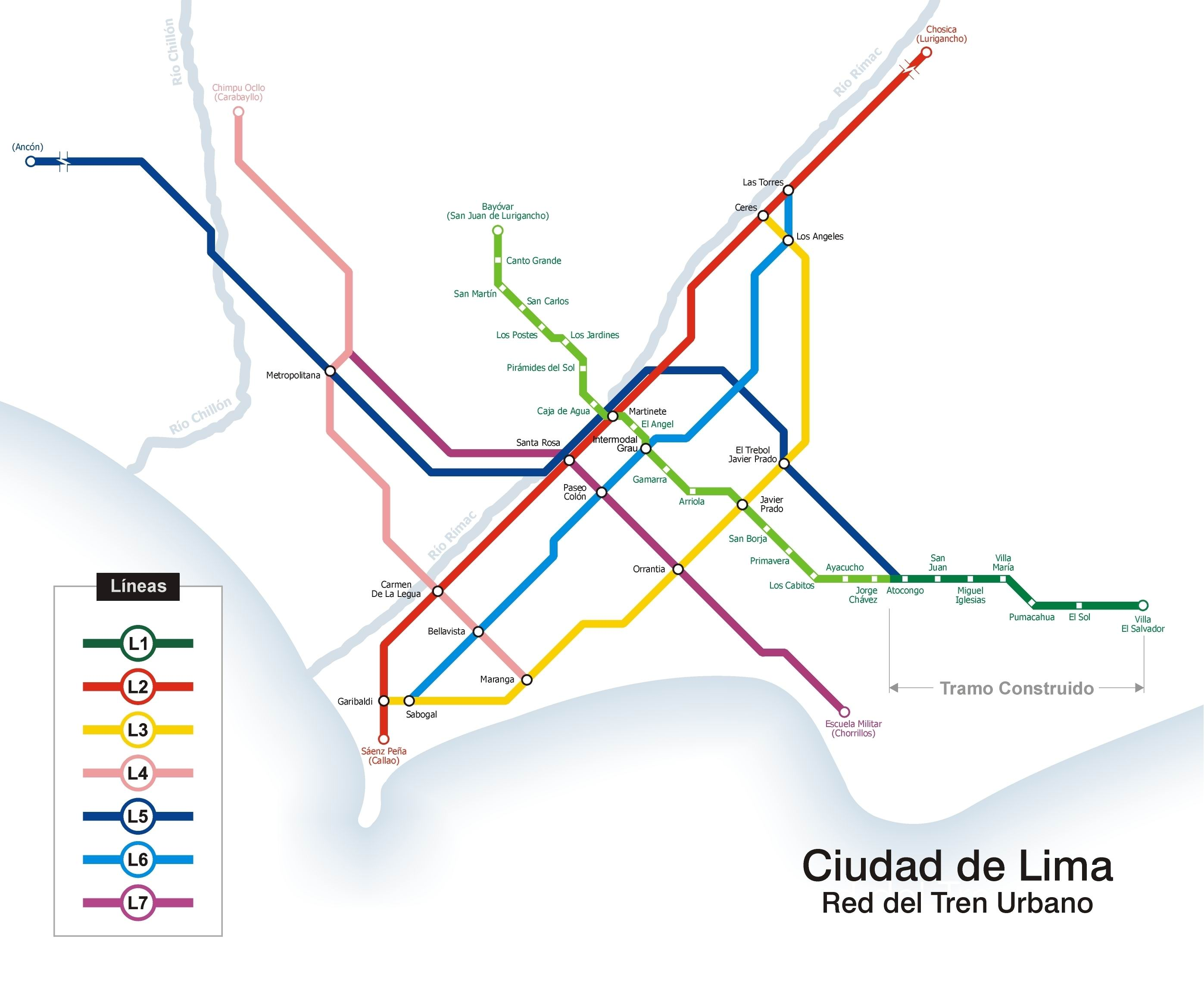 Plano de las 7 líneas del metro de Lima